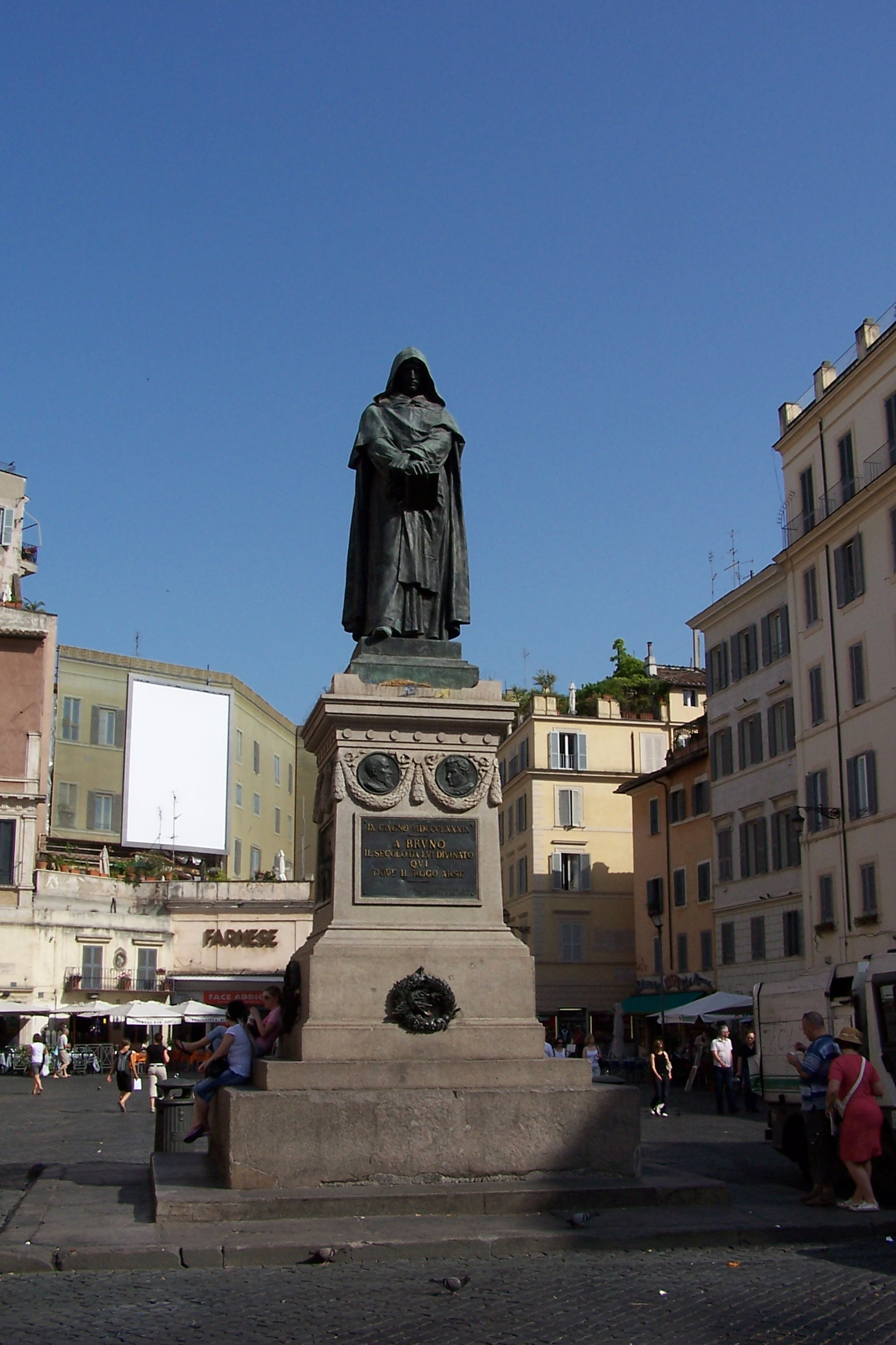 Statue Giordano Bruno auf dem Campo Fiori in Rom